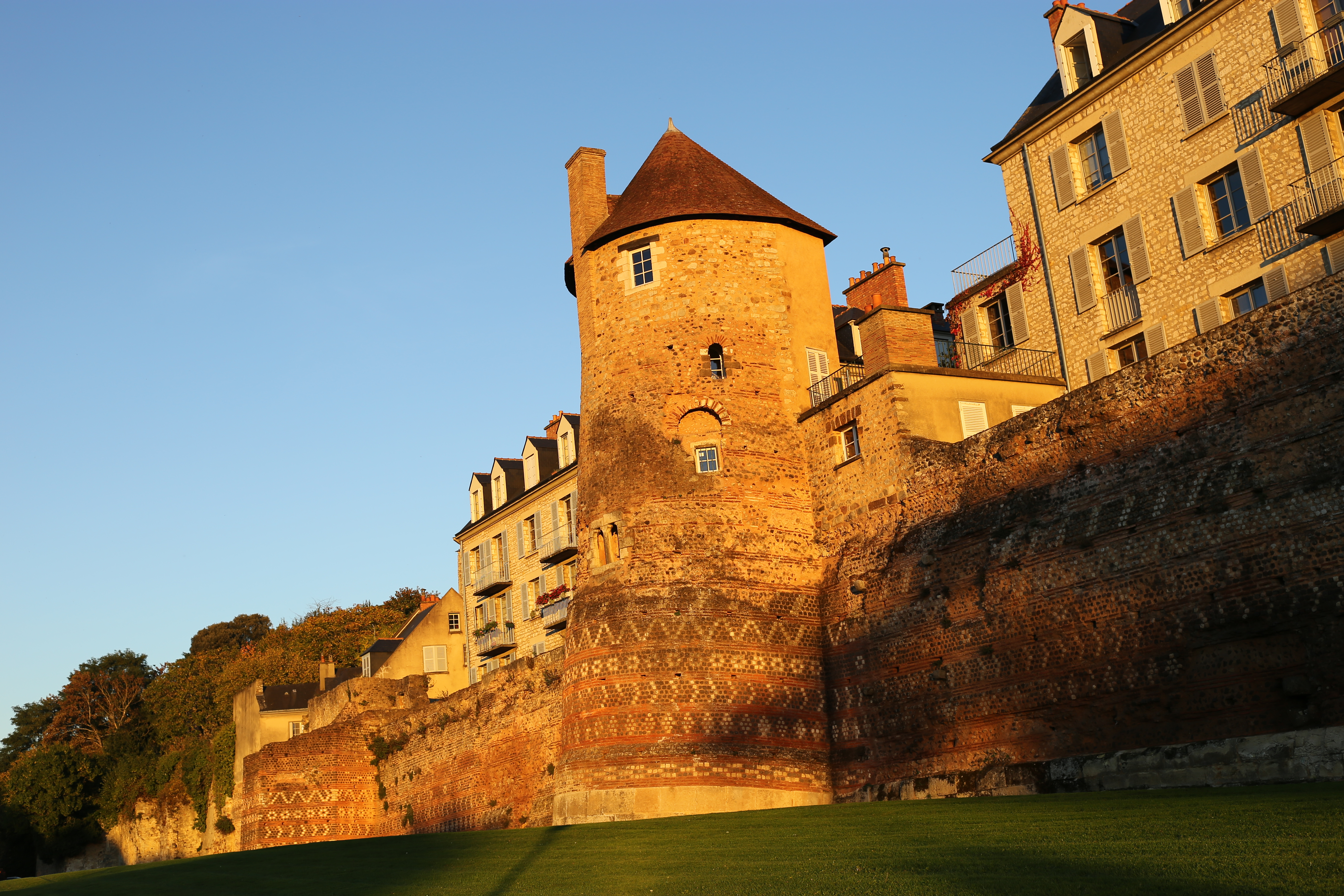 Remparts Vieux-Mans